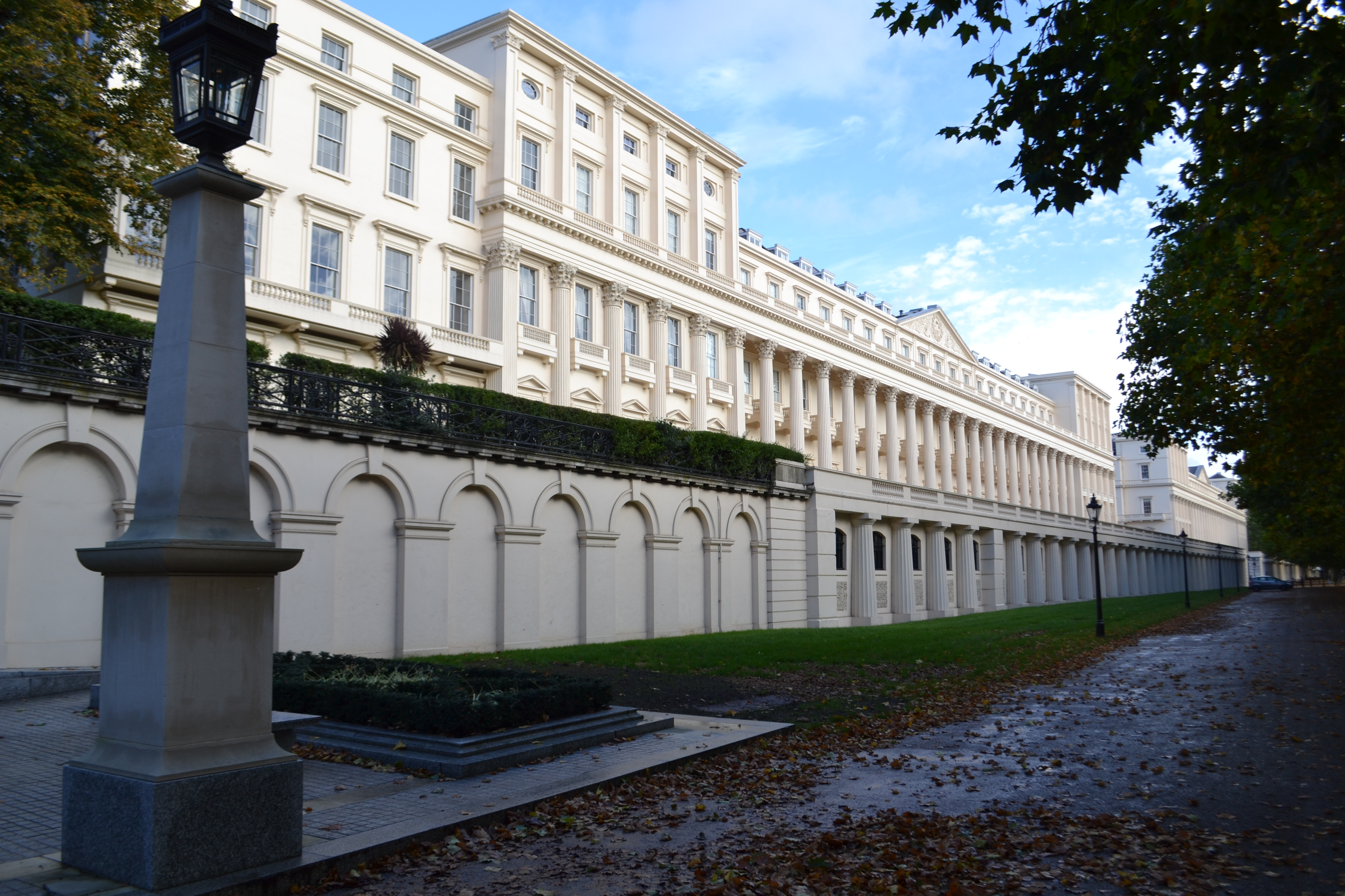 Carlton House Terrace, Londres ; œuvre de l'architecte John Nash.